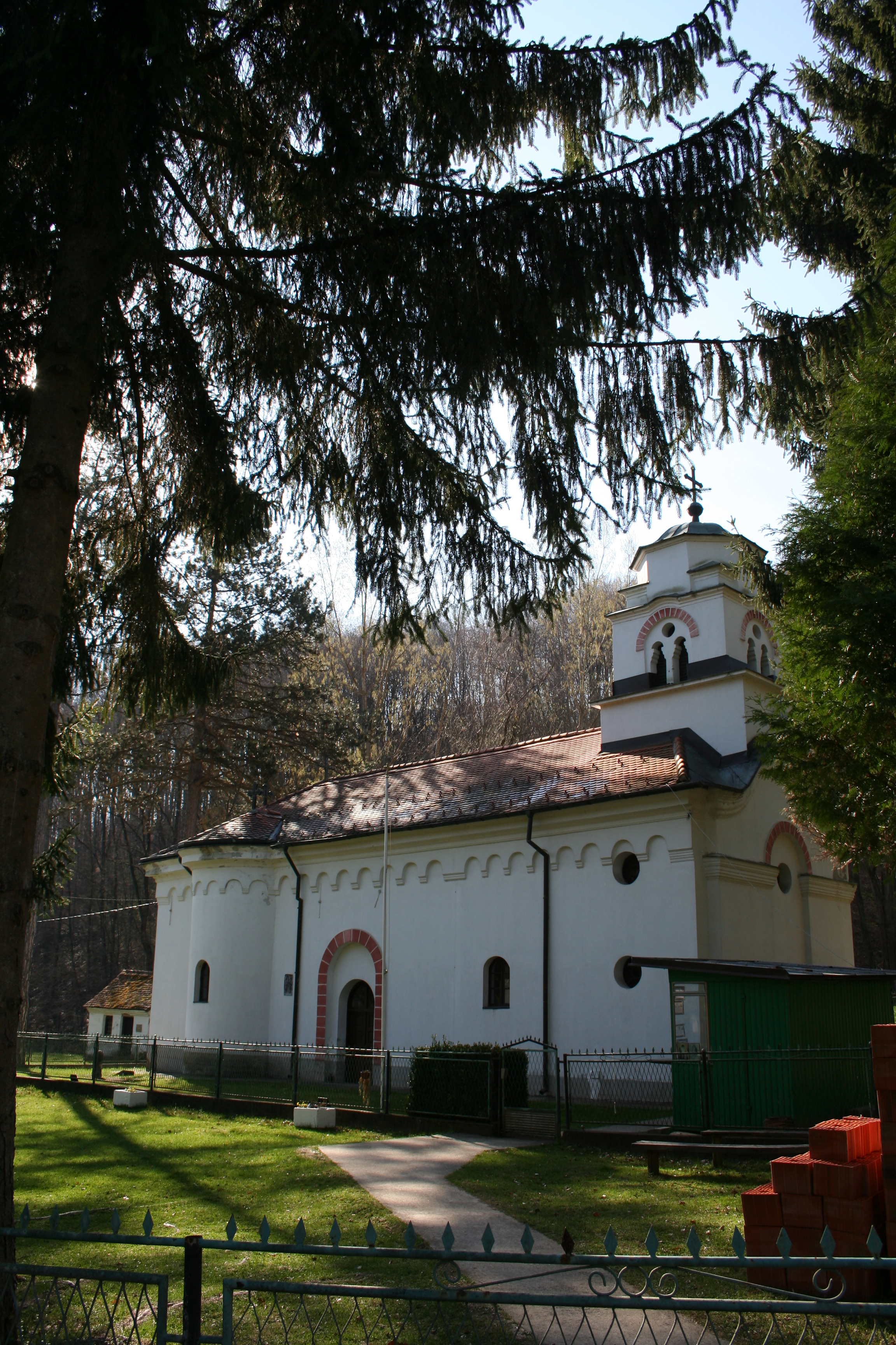 Crkva Prenosa moštiju Sv. Nikolaja, Pričević